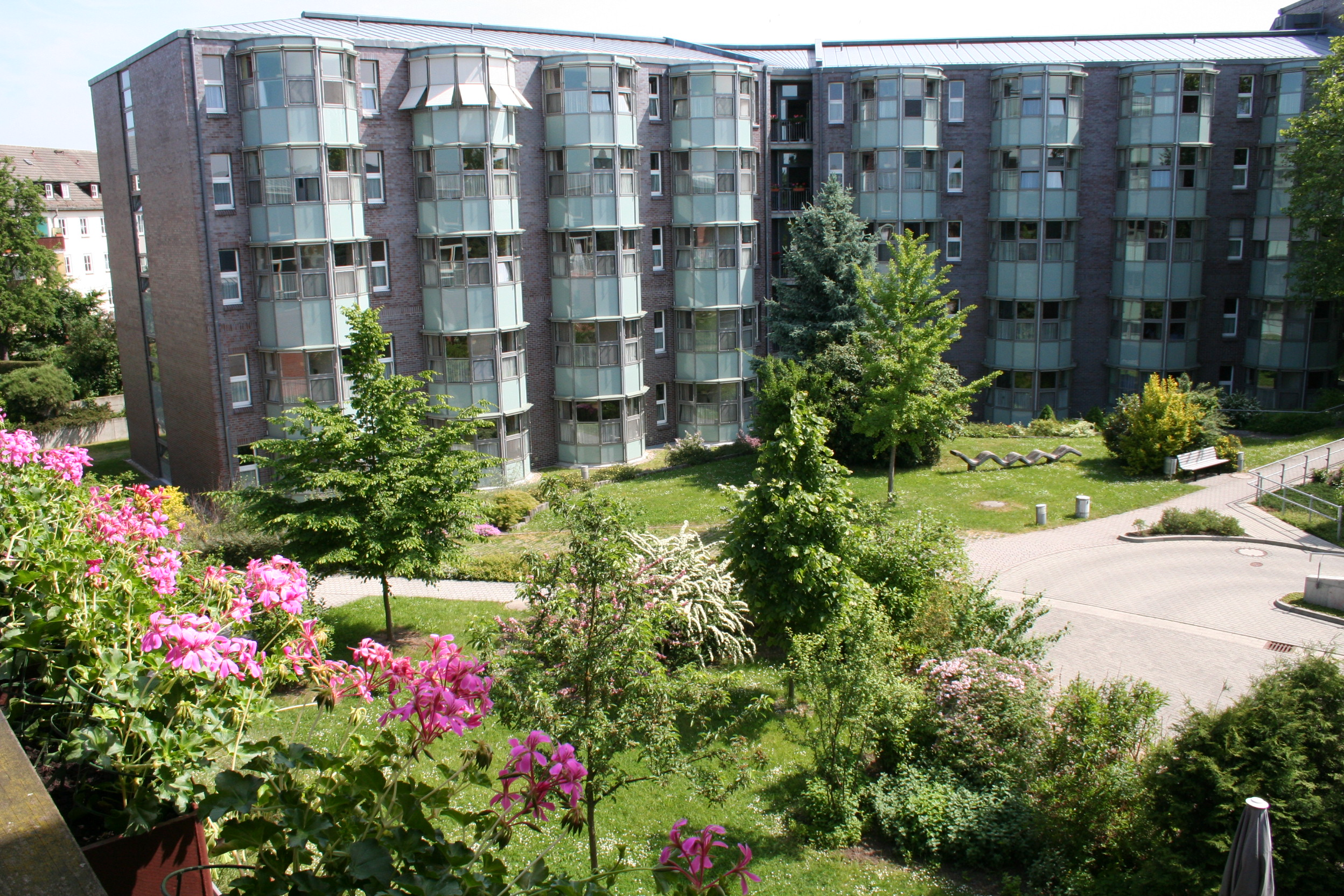 DKD Bettenhaus